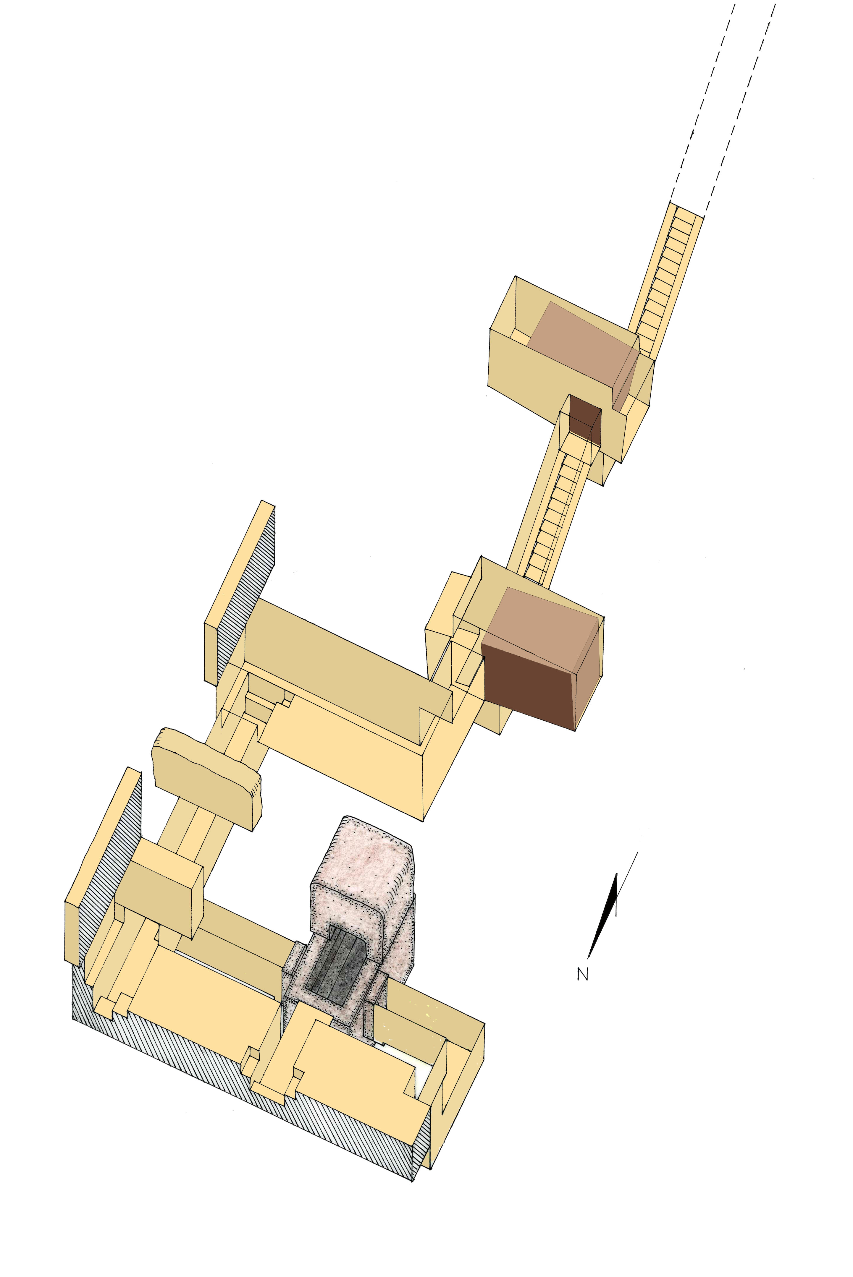 Vue des appartements funéraires de la pyramide sud de Mazghouna